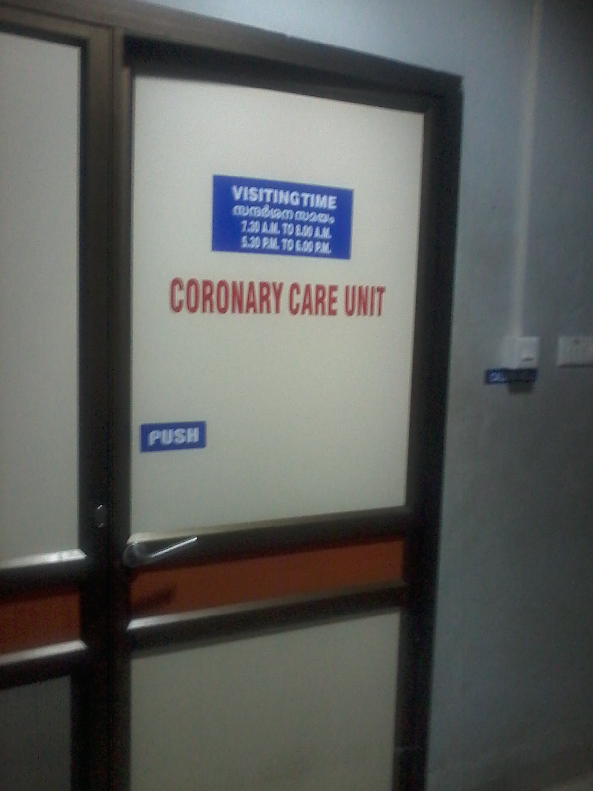 CCU IN A HOSPITAL